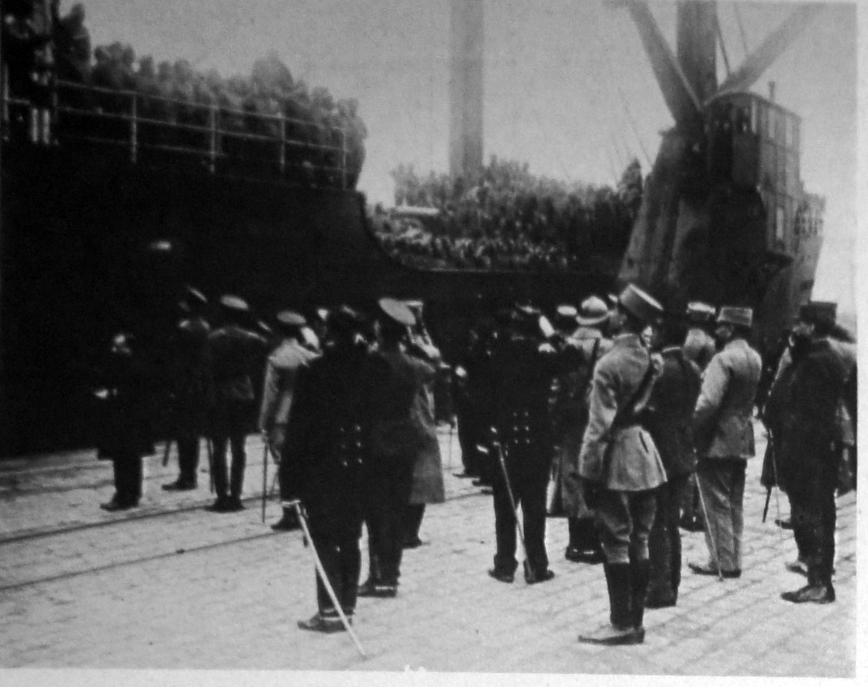 trait du journal "le miroir".